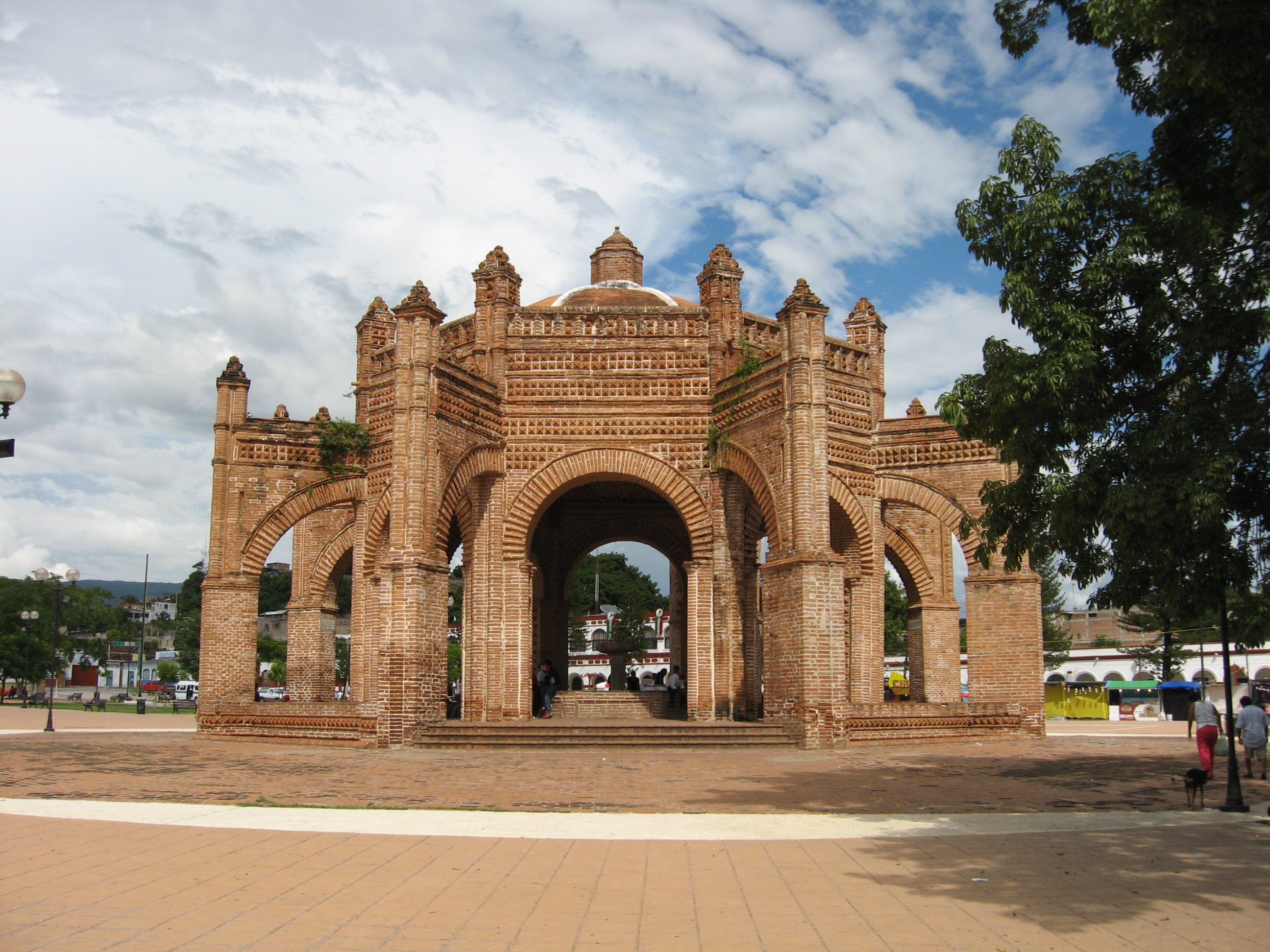 La Pila de Chiapa de Corzo. Se encuentra ubicada en el parque central, construida en 1562 por Fray Rodrigo León, se le conoce como la pila ya que abastecía de agua a la ciudad y era punto de encuentro para la población.